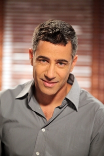 שרון צור